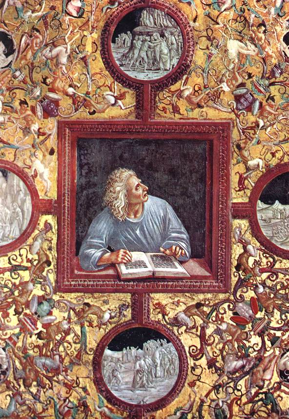 SIGNORELLI, Luca Poets: Virgil Fresco Chapel of San Brizio, Duomo, Orvieto